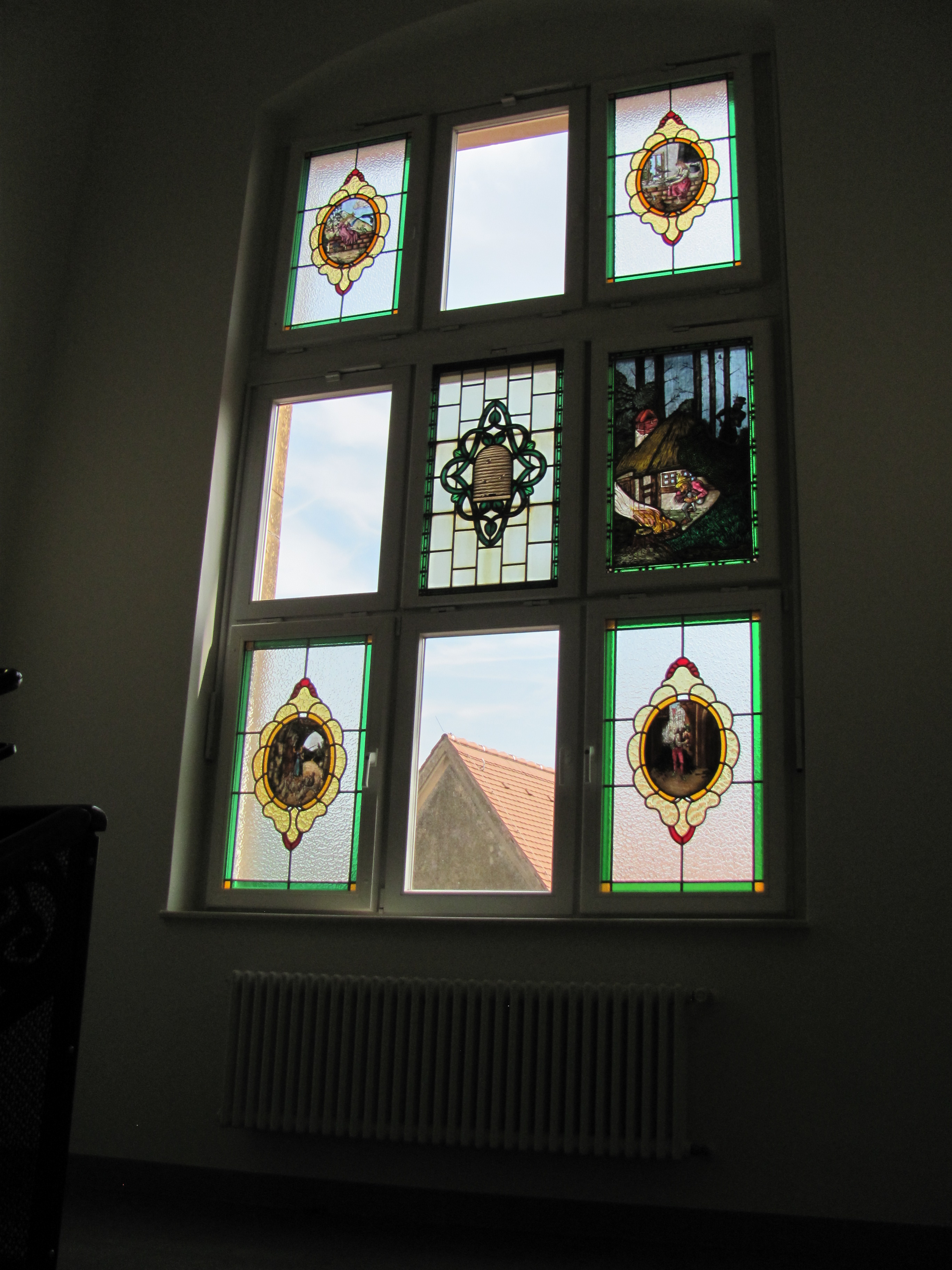 Radebeul-Naundorf Schule